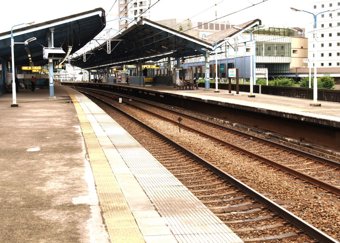 京急鶴見駅プラットホーム